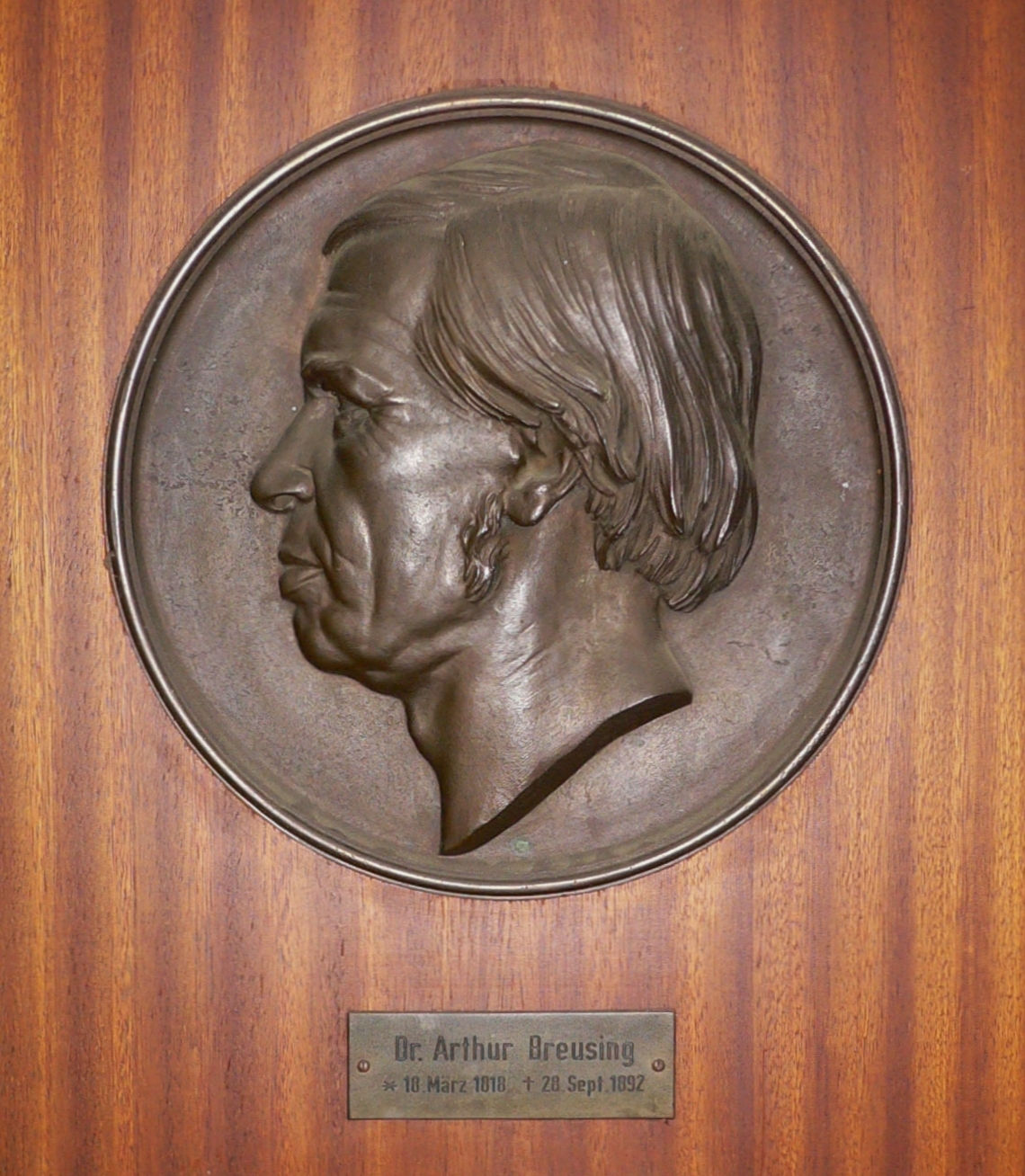 Porträtmedaillon von Arthur Breusing im Eingang der Hochschule Bremen (Werderstr. 73) nach Johann Friedrich Wilhelm Everdings Modell, gegossen von Wilhelm Kallmeyer. Das Medaillon war ursprünglich Bestandteil von Breusings Grabstein auf dem Waller Friedhof.